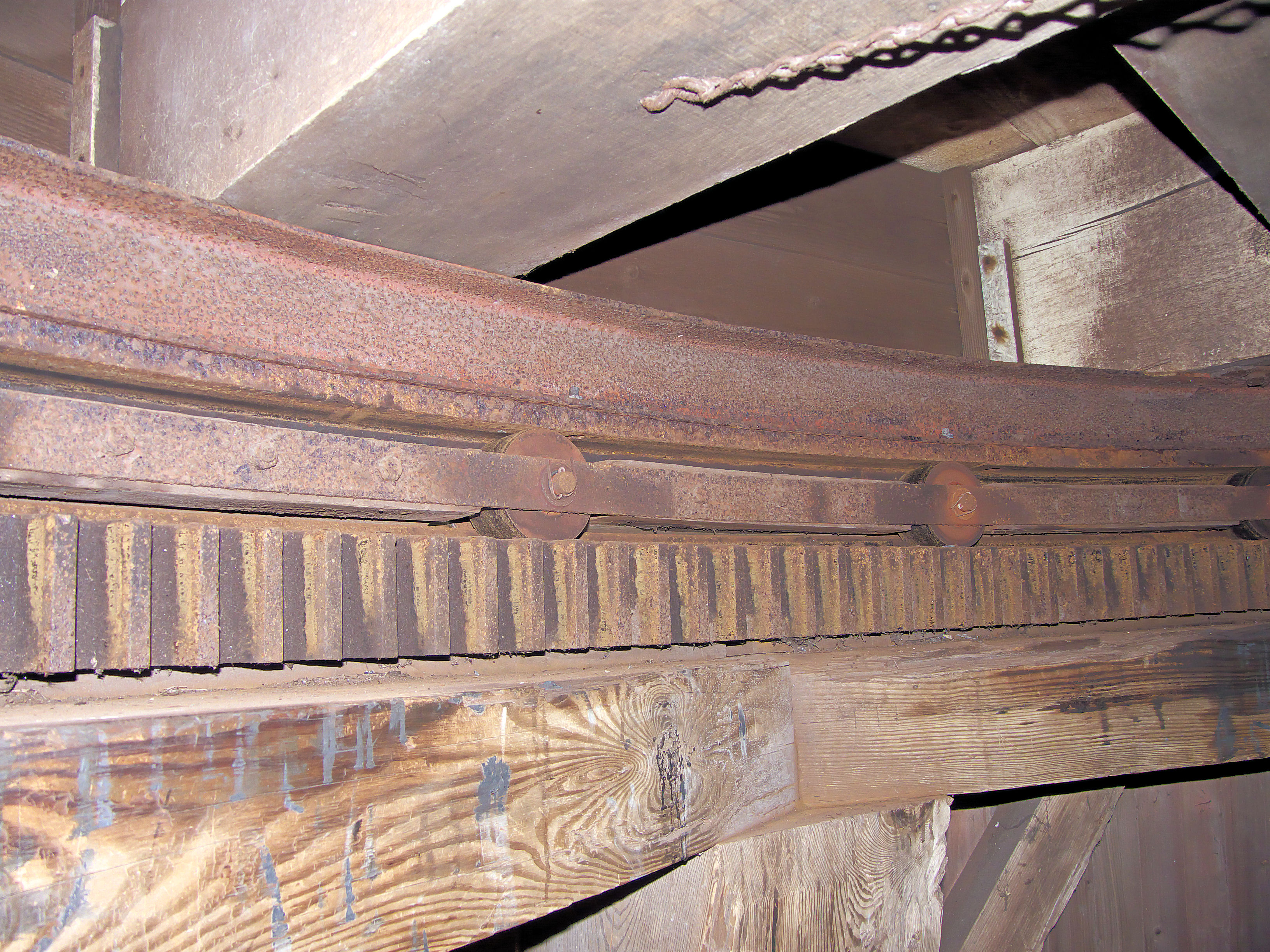 Rote Zwillingsmuehle Greetsiel, Drehkranz Selbstdreher oberes Tafelment